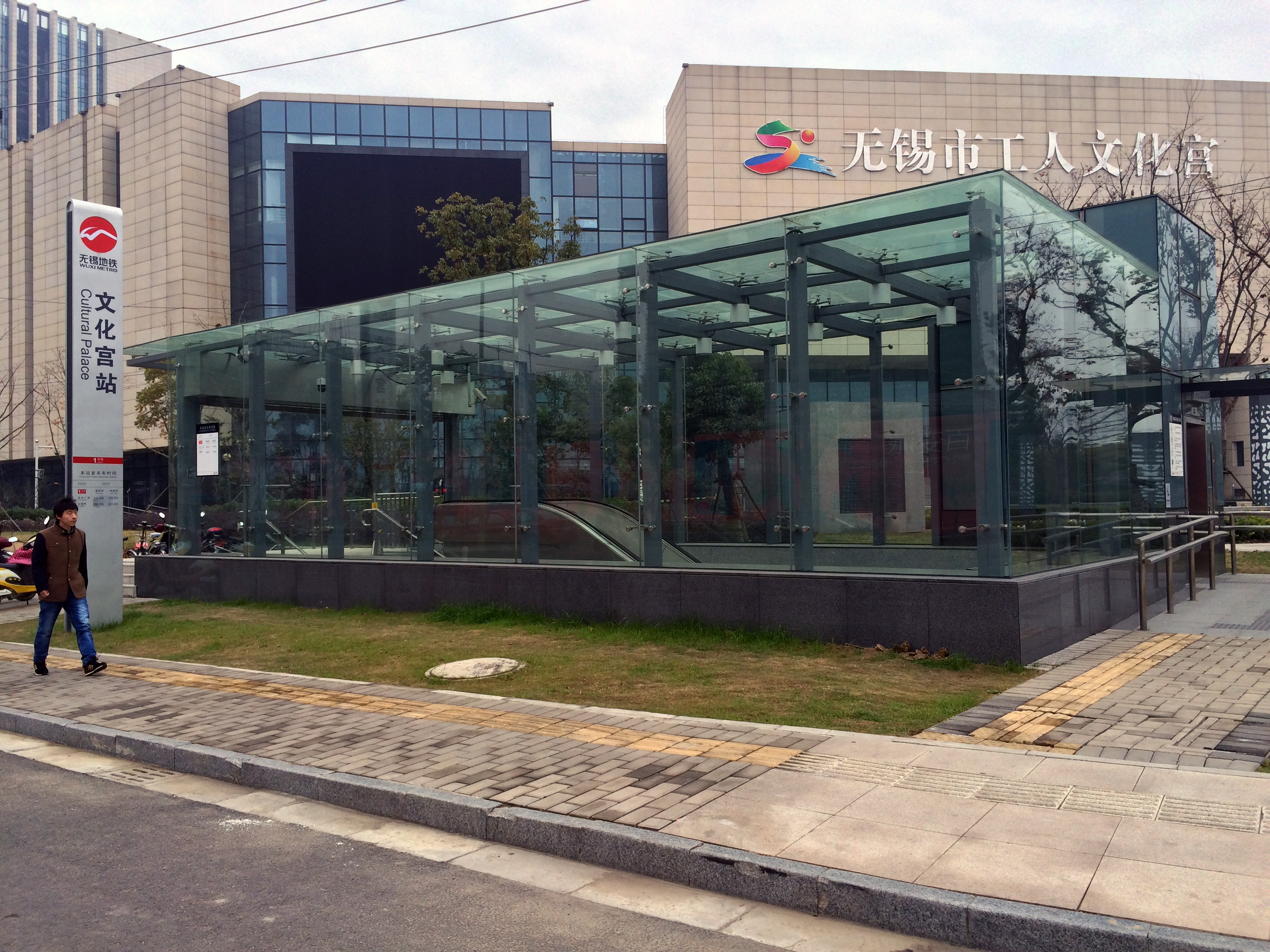 無錫地鐵1號線文化宮站3A號口